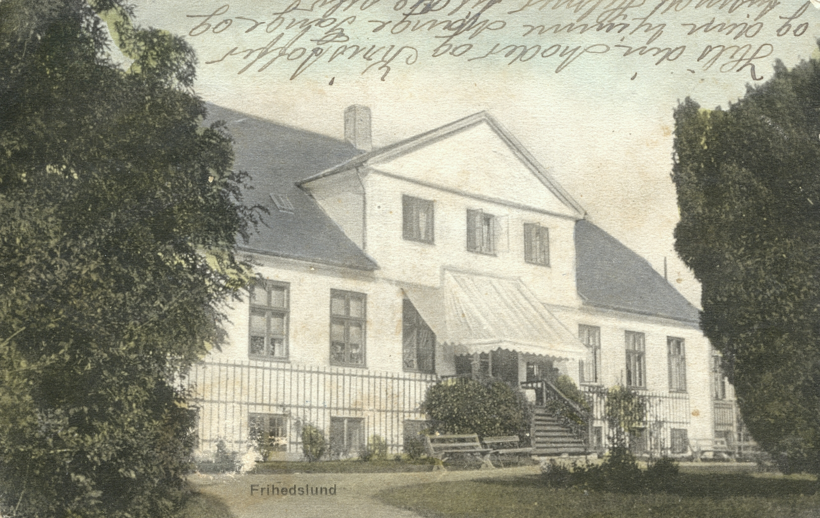 Frihedslund, avlsård i Sæby Sogn, Kalundborg Kommune. Postkortet er sendt af lærer Hans Jørgen Jensen Høj (1874-1913), der var Hchristophersens mormors bror. Han havde gået på Vordingborg Seminarium, var lærer i Nøbbet på Nordvest-Lolland, og kortene er sendt til familien i Vanthore (Vantore) ved Nysted på Sydøst-Lolland.